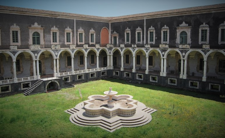 Chiostro dei Marmi - Monastero dei Benedettini di San Nicolò l'Arena, Catania